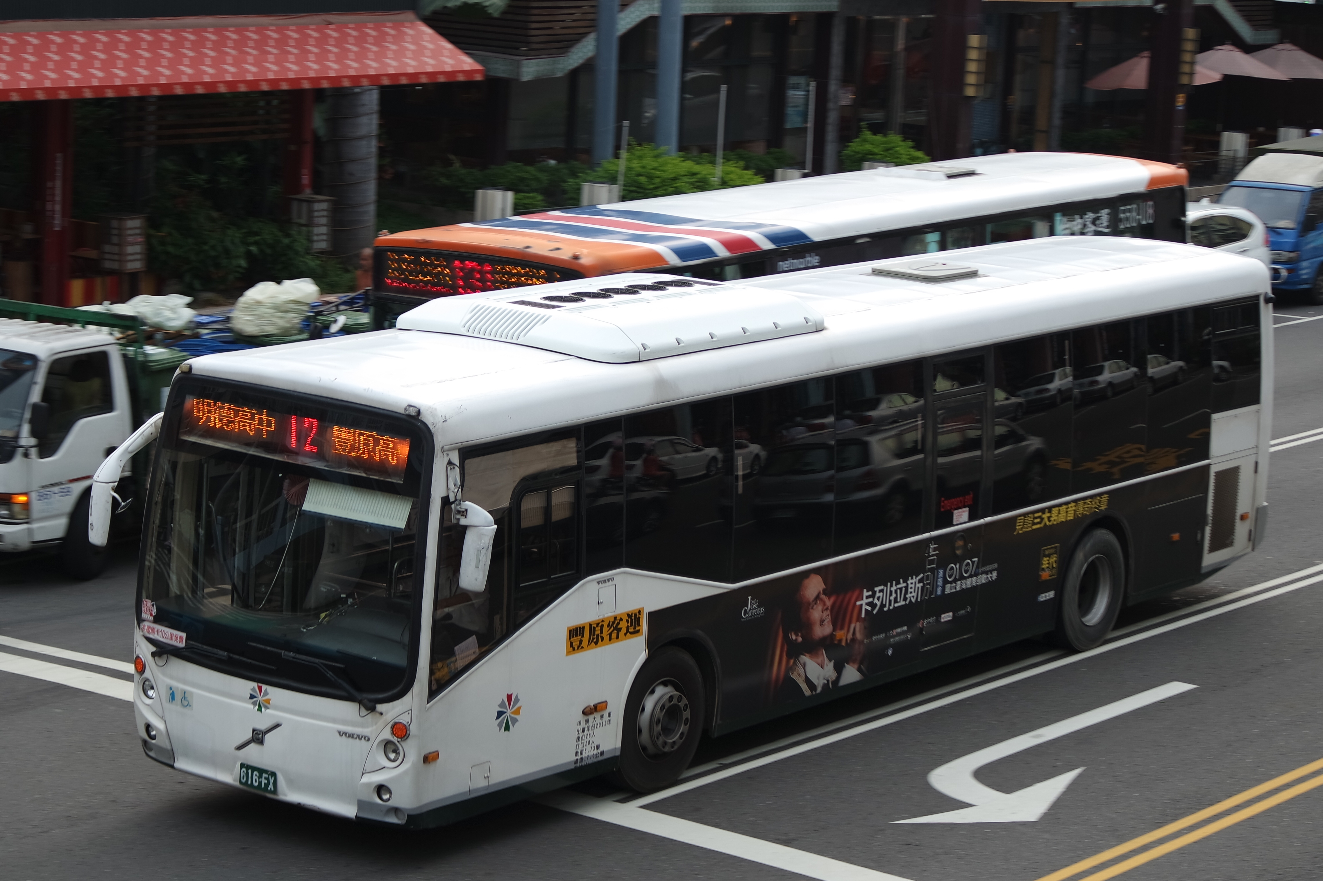 豐原客運VOLVO大客車616-FX 台中市公車12路